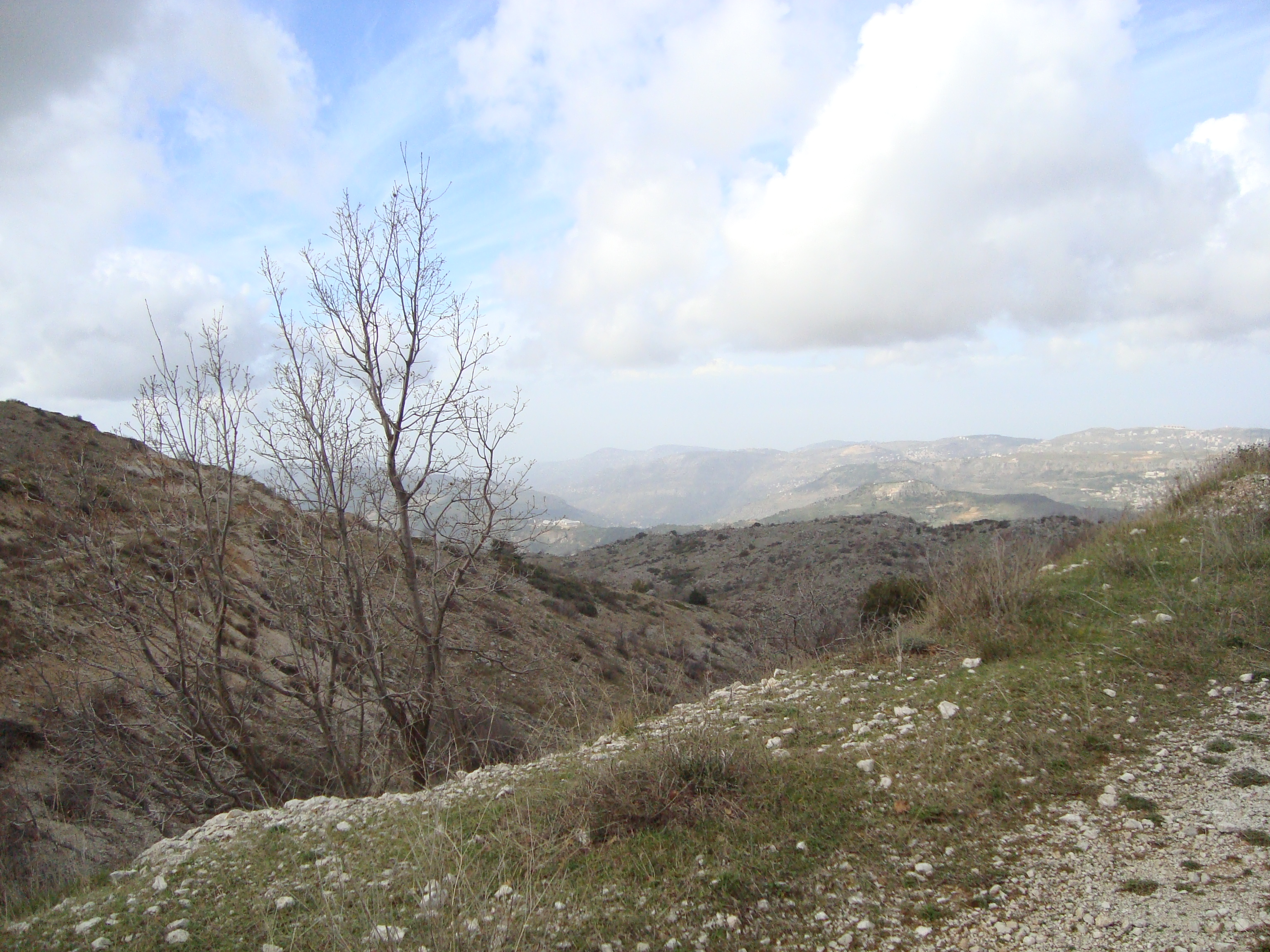 Bmahray, Lebanon